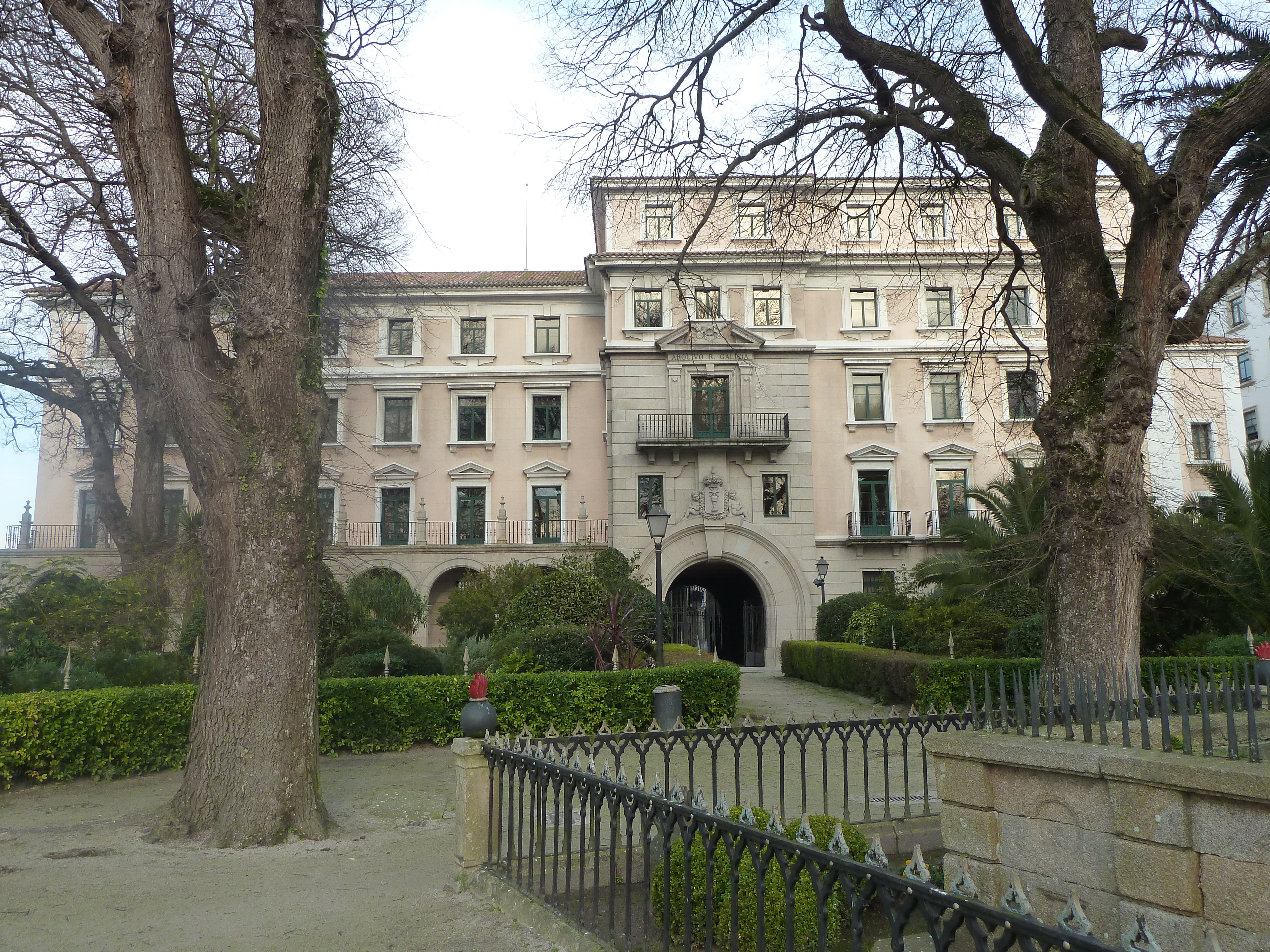 Vista xeral do Arquivo do Antigo Reino de Galicia na Coruña.